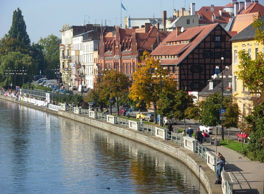 Ulica Stary Port w Bydgoszczy